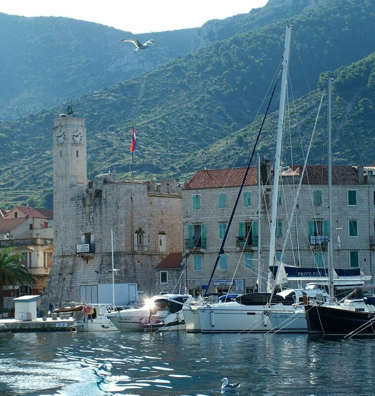 Muzeum rybackie (wieża po lewej) w Komizy na Vis, widziane z zatoki.